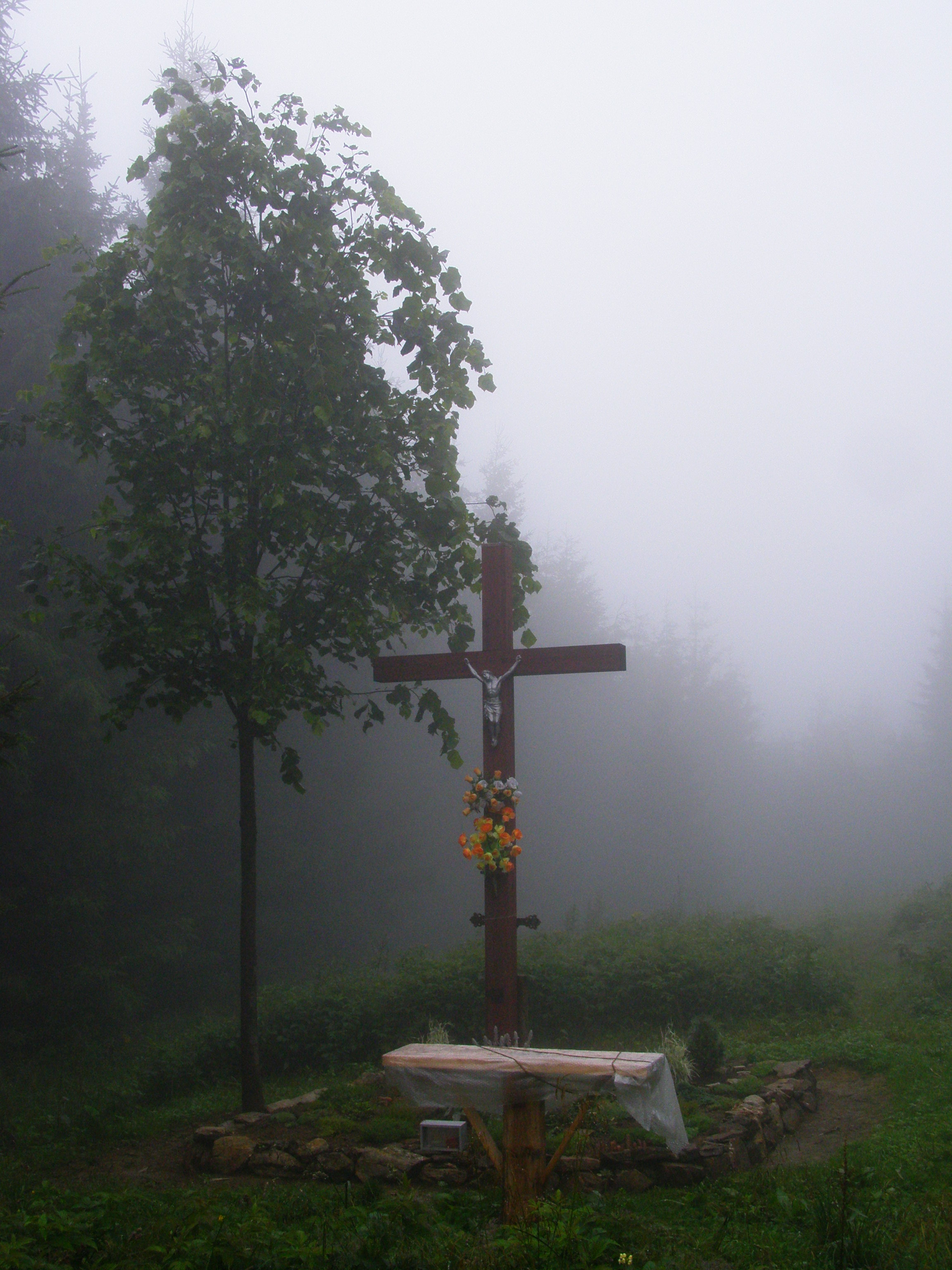 Lúčanská Fatra, Sedlo pod Hnilickou Kýčerou